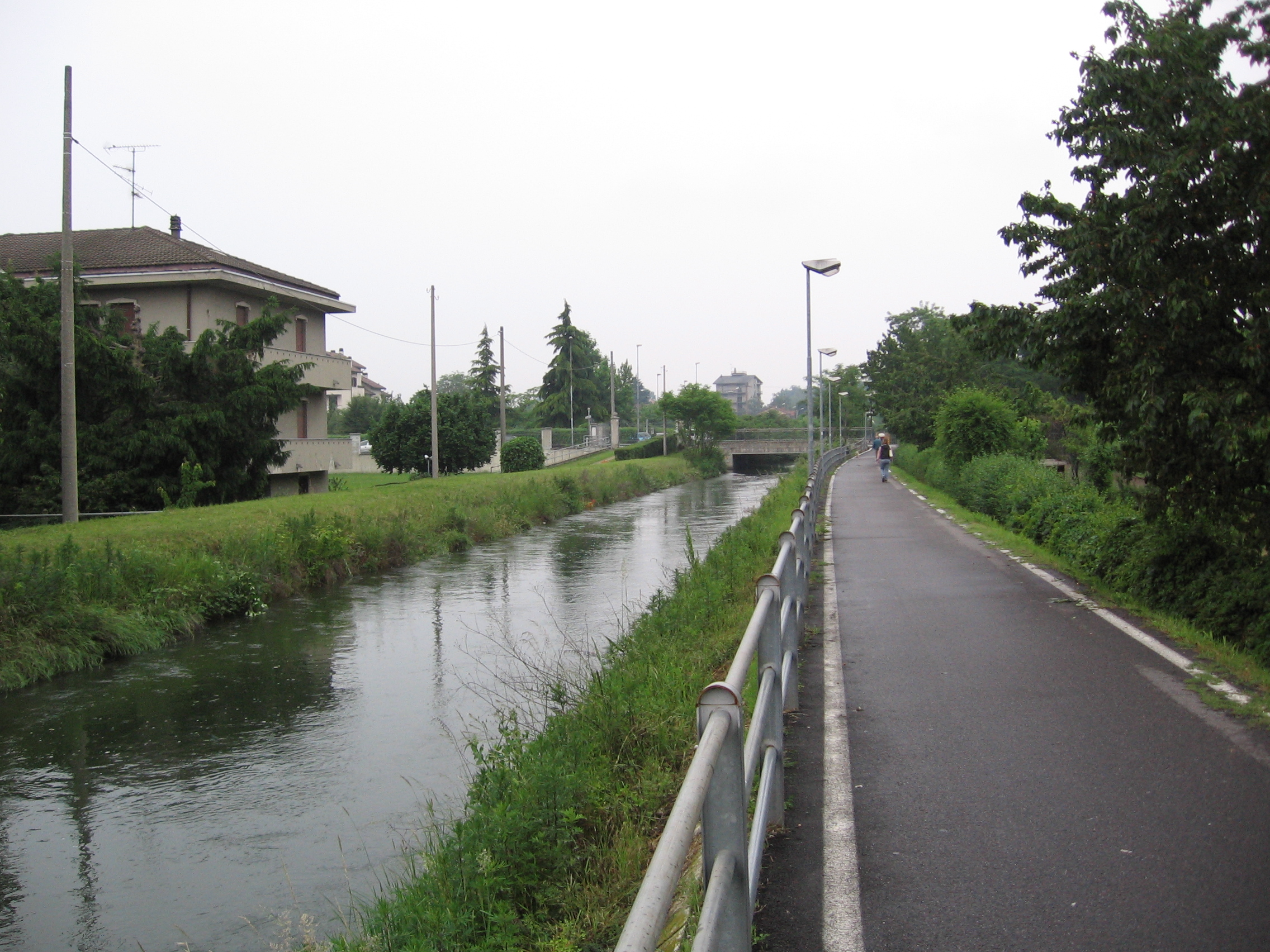 Villoresi canal in Monza, borough Triante